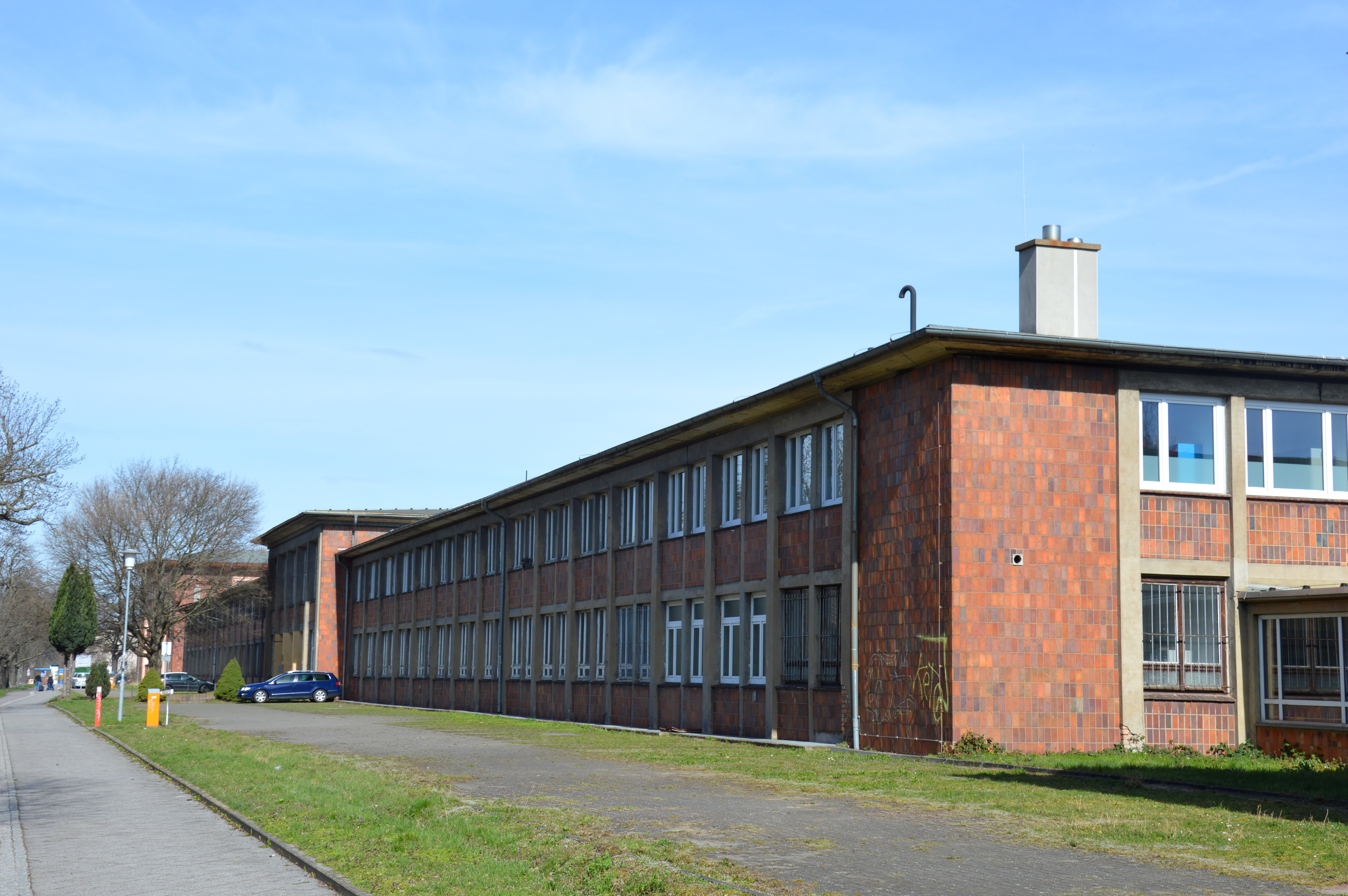 Maybachstraße Verwaltungsbau